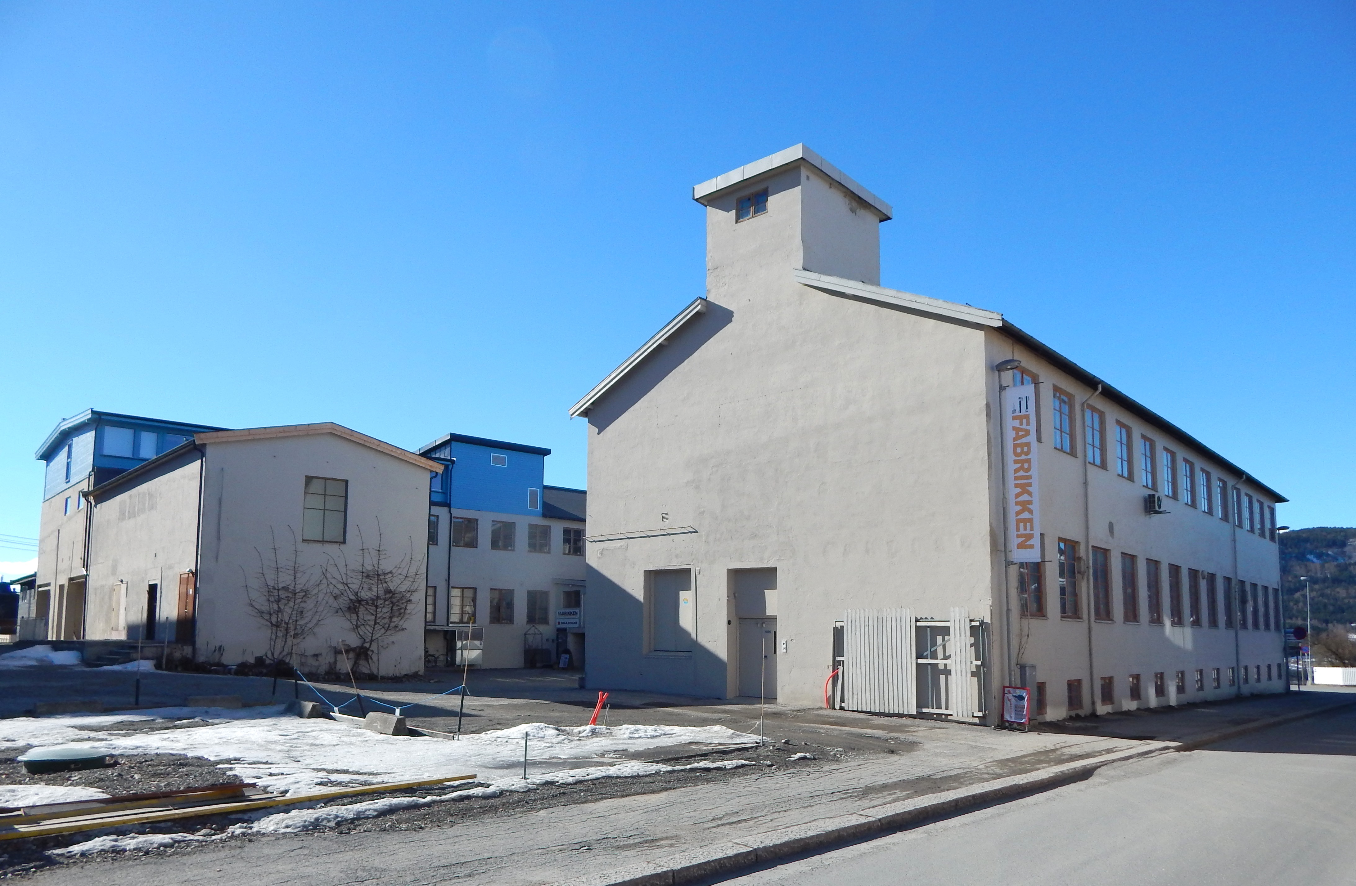 Fabrikken på Lillehammer